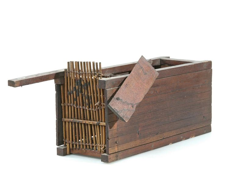 Model. Houten model van een val voor het vangen van tijgers